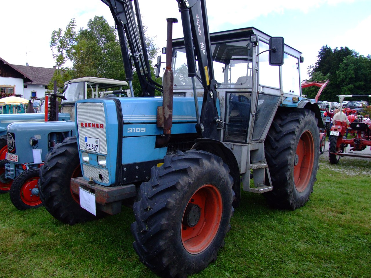 Eicher 3105 mit 105 PS, Baujahr 1977